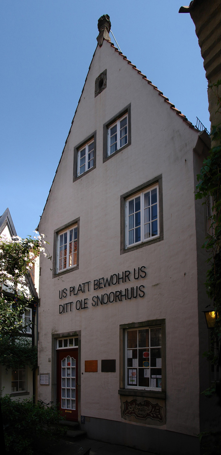 Institut für niederdeutsche Sprache im Schnoor in BremenDas abgebildete Objekt ist ein geschütztes Kulturdenkmal in der Freien Hansestadt Bremen, mit der Nr. 1487 beim Landesamt für Denkmalpflege registriert.